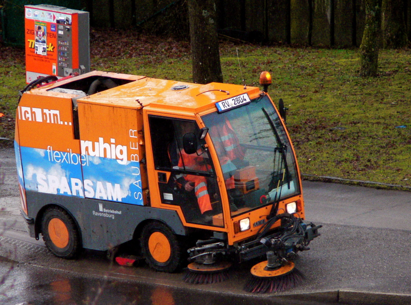 Kleine Kehrmaschine zur Reinigung von Gehwegen, Fussgängerzonen und Bereichen ohne KFZ-Verkehr